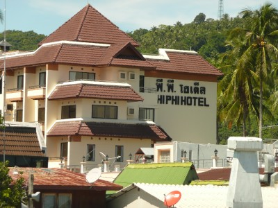 Koh Phi Phi Island